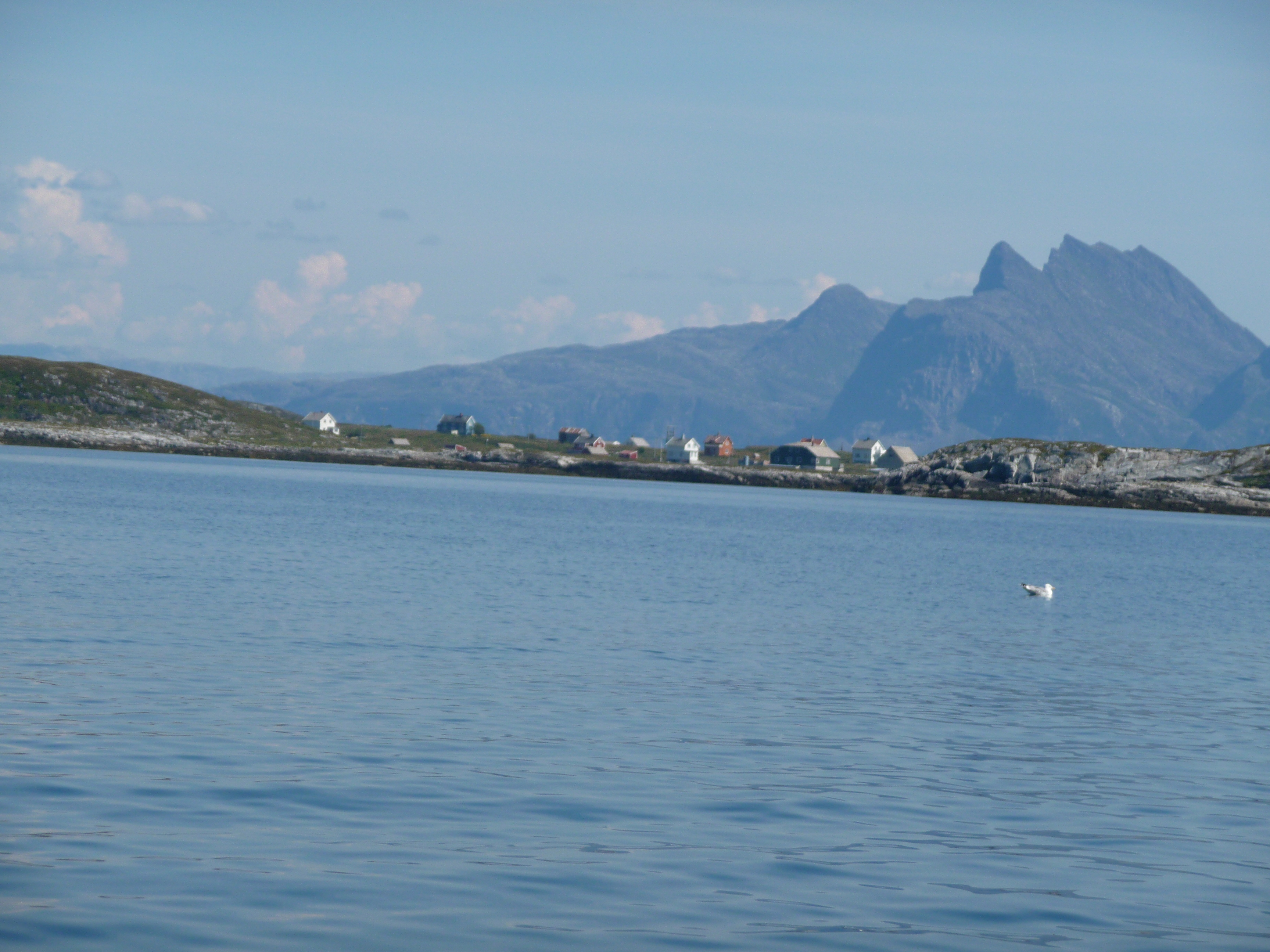 Gåsvær i fra vest med Dønnamannen i Bakgrunn